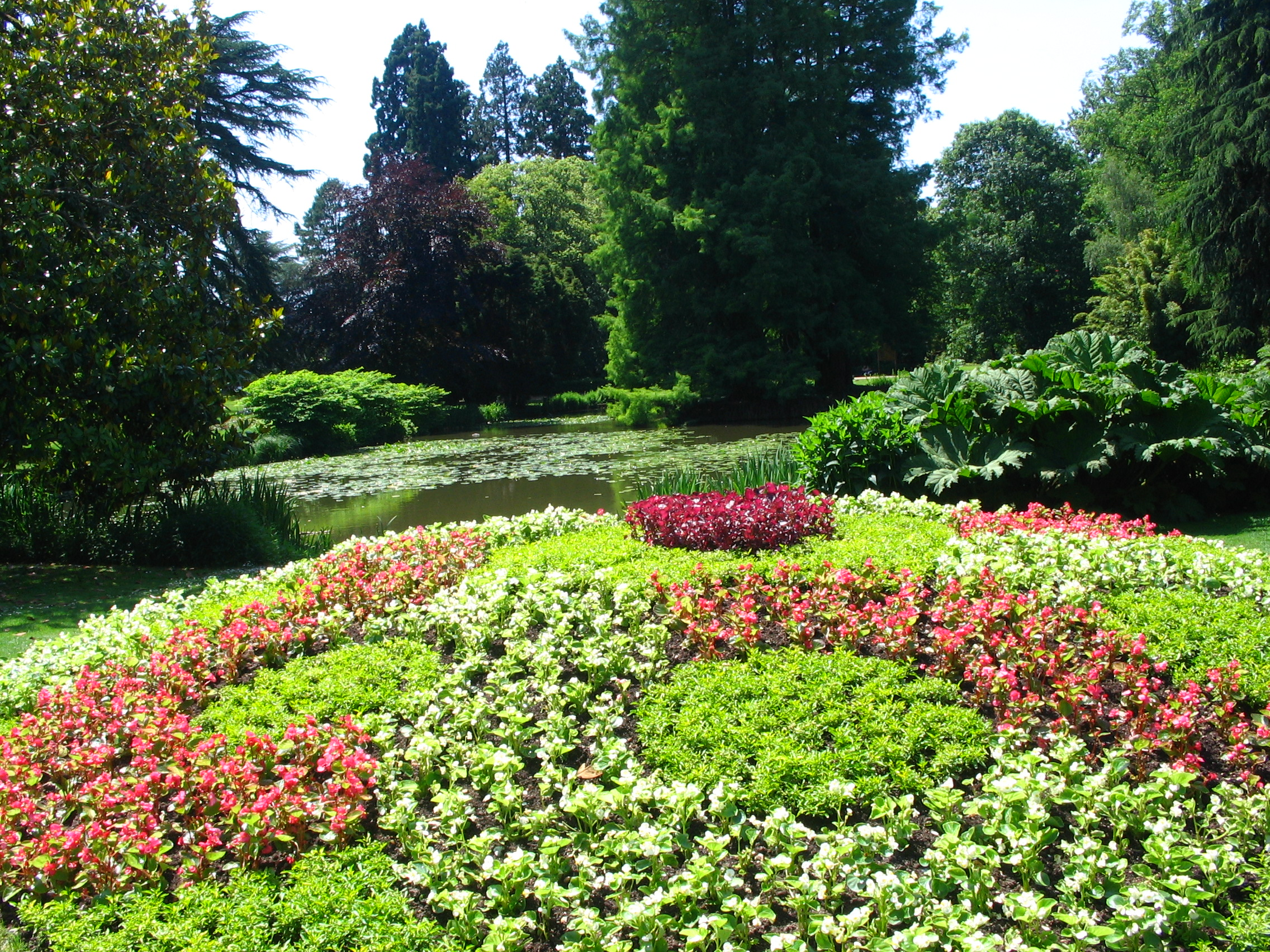 Jardin des Prébendes à Tours (37).